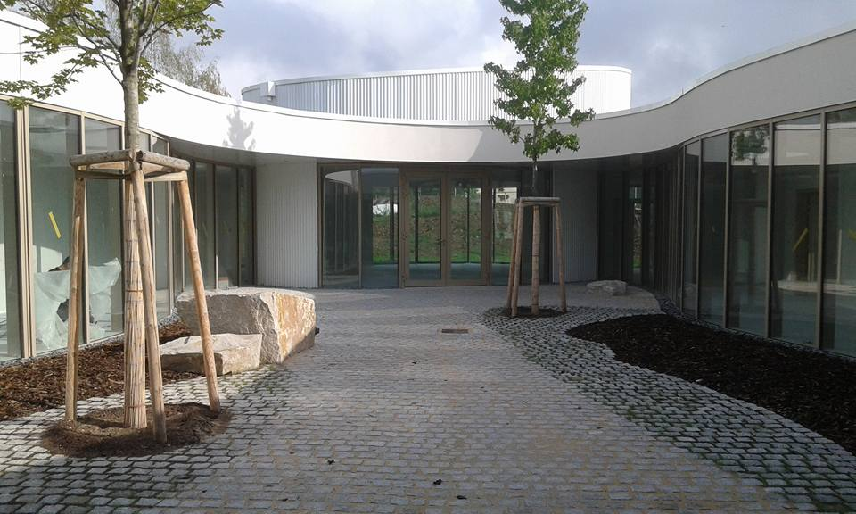 la nouvelle école est composée de 11 salles de classe, d'une salle d'arts plastiques/sciences et d'une bibliothèque. Il y a aussi deux patios qui éclairent le couloir.